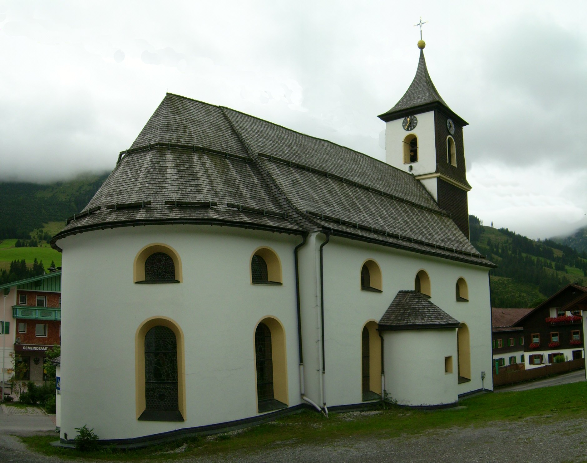 Kirchel Zöblen Österreich